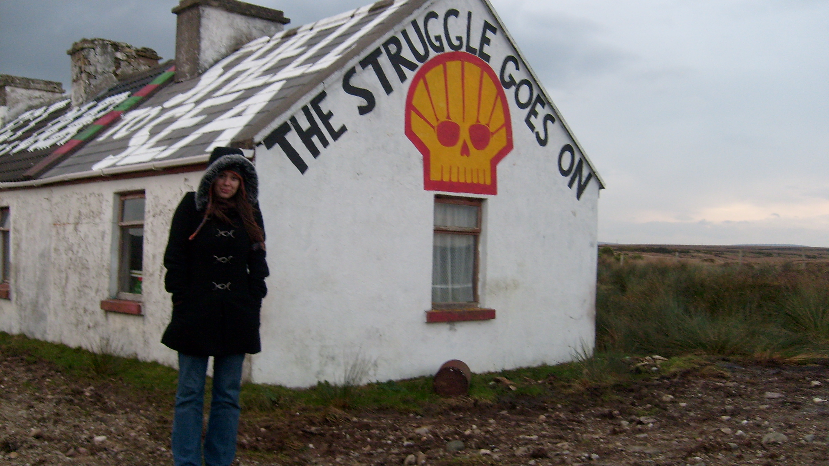 Glenamoy mural